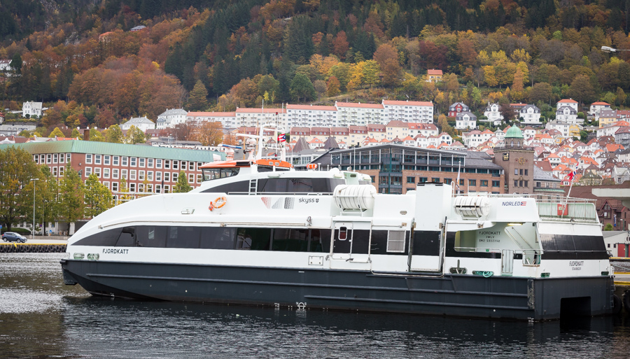 MS Fjordkatt ligger ved Munkebrygge, Bergen, i 2015.